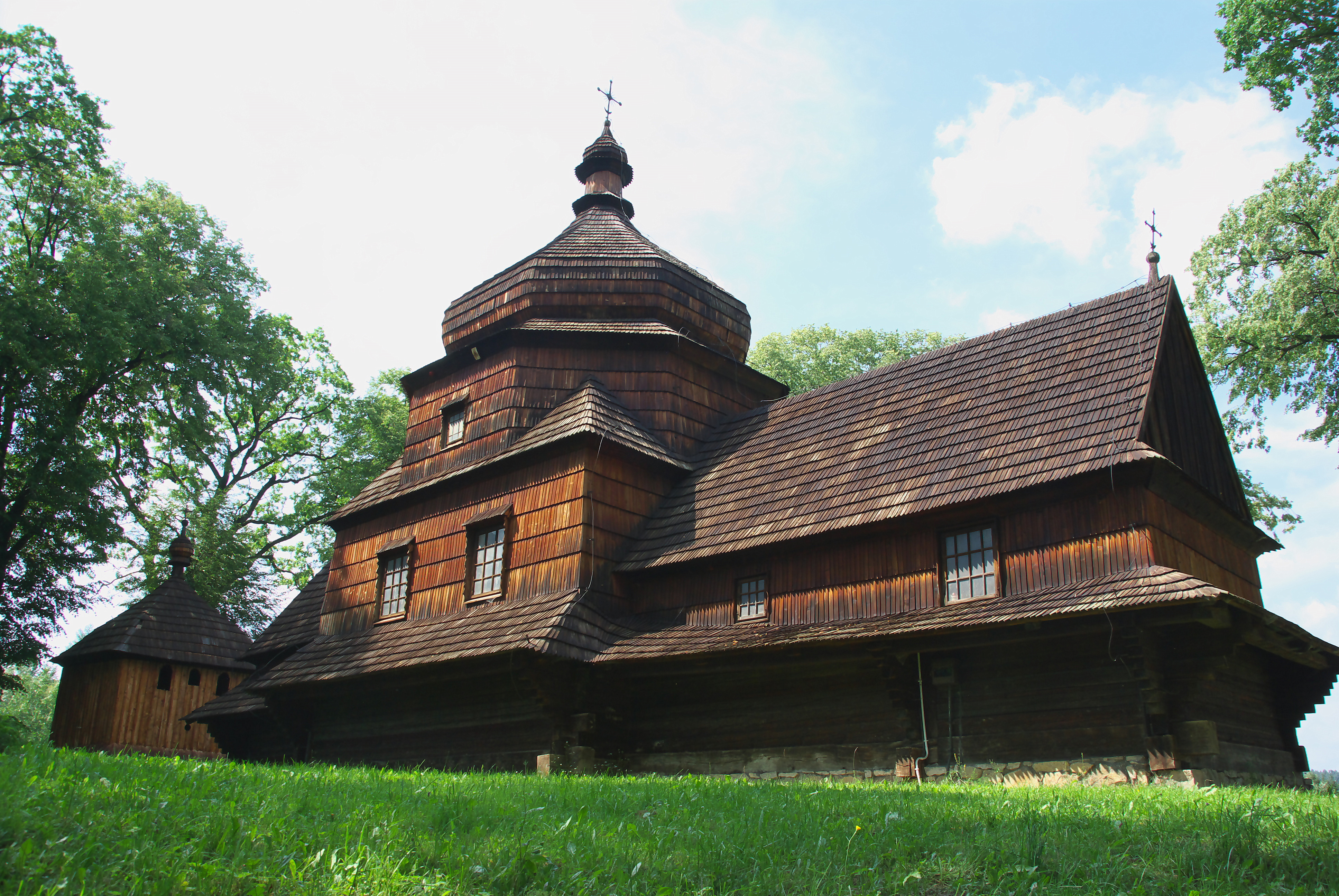 Zespół cerkwi Przemienienia Pańskiego w Czerteżu (A-159 z 08.05.1968)